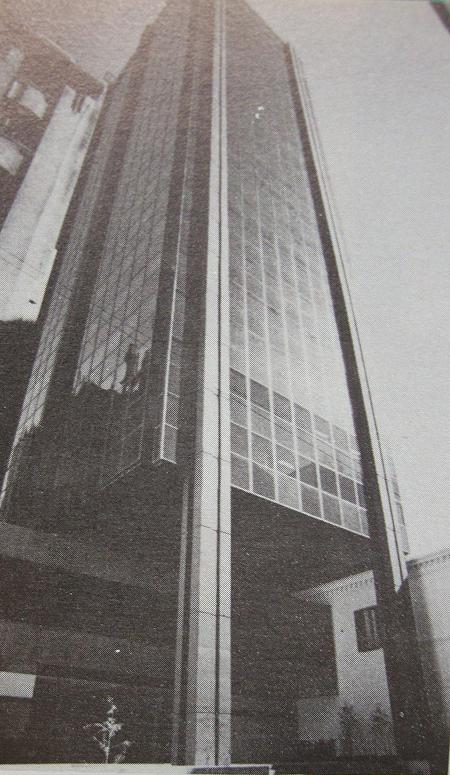 Torre Esmeralda, en Esmeralda 130. Arquitectos: SEPRA y Robirosa-Beccar Varela. Buenos Aires, Argentina.